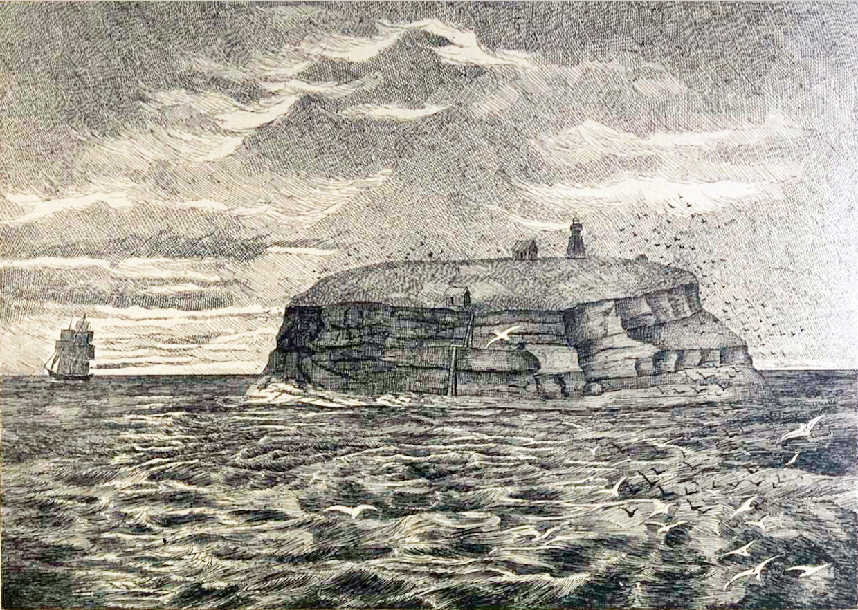 Le rocher aux oiseaux et son phare, dans le golfe du Saint-Laurent.